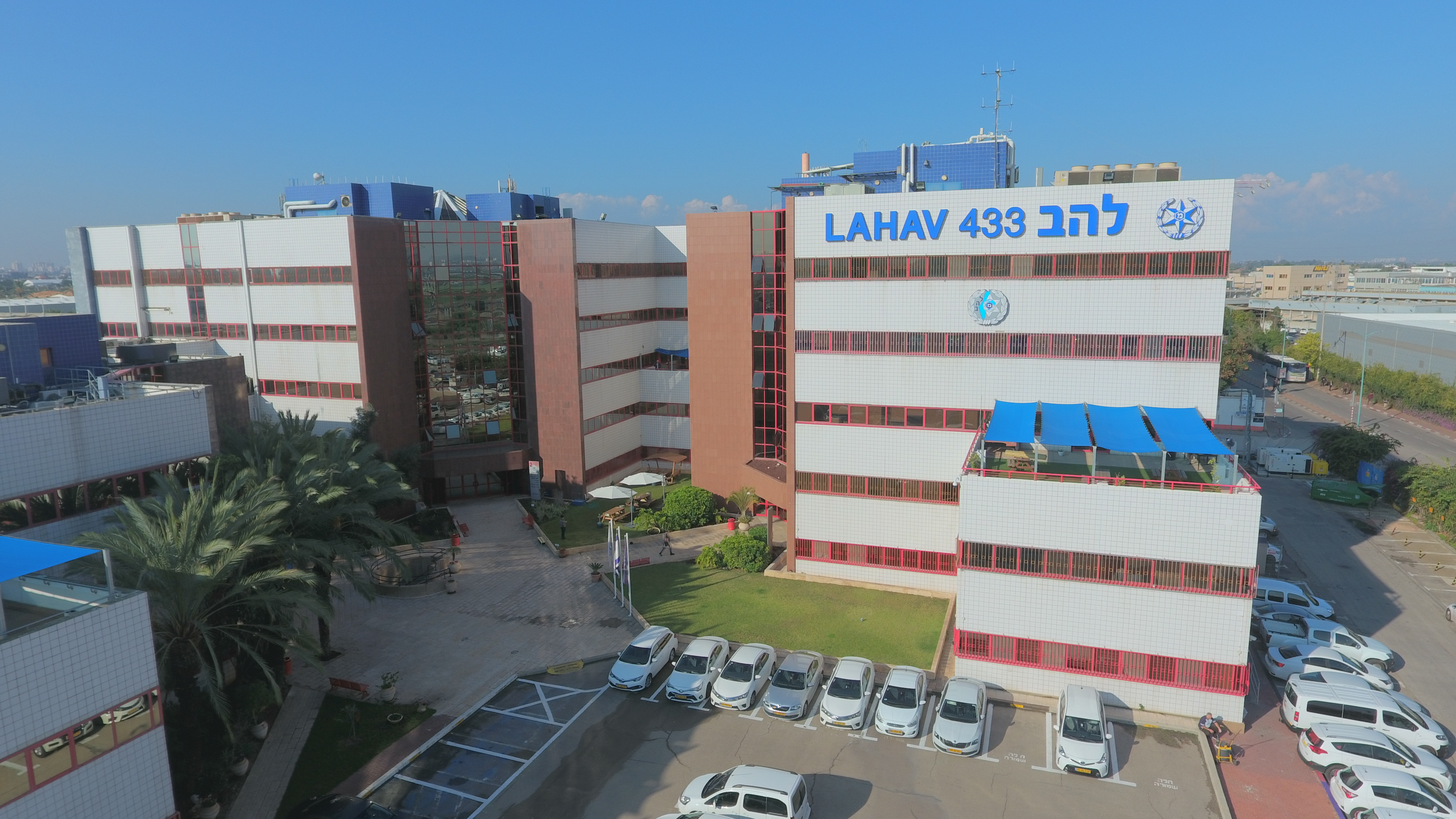 משרדי להב 433 בלוד